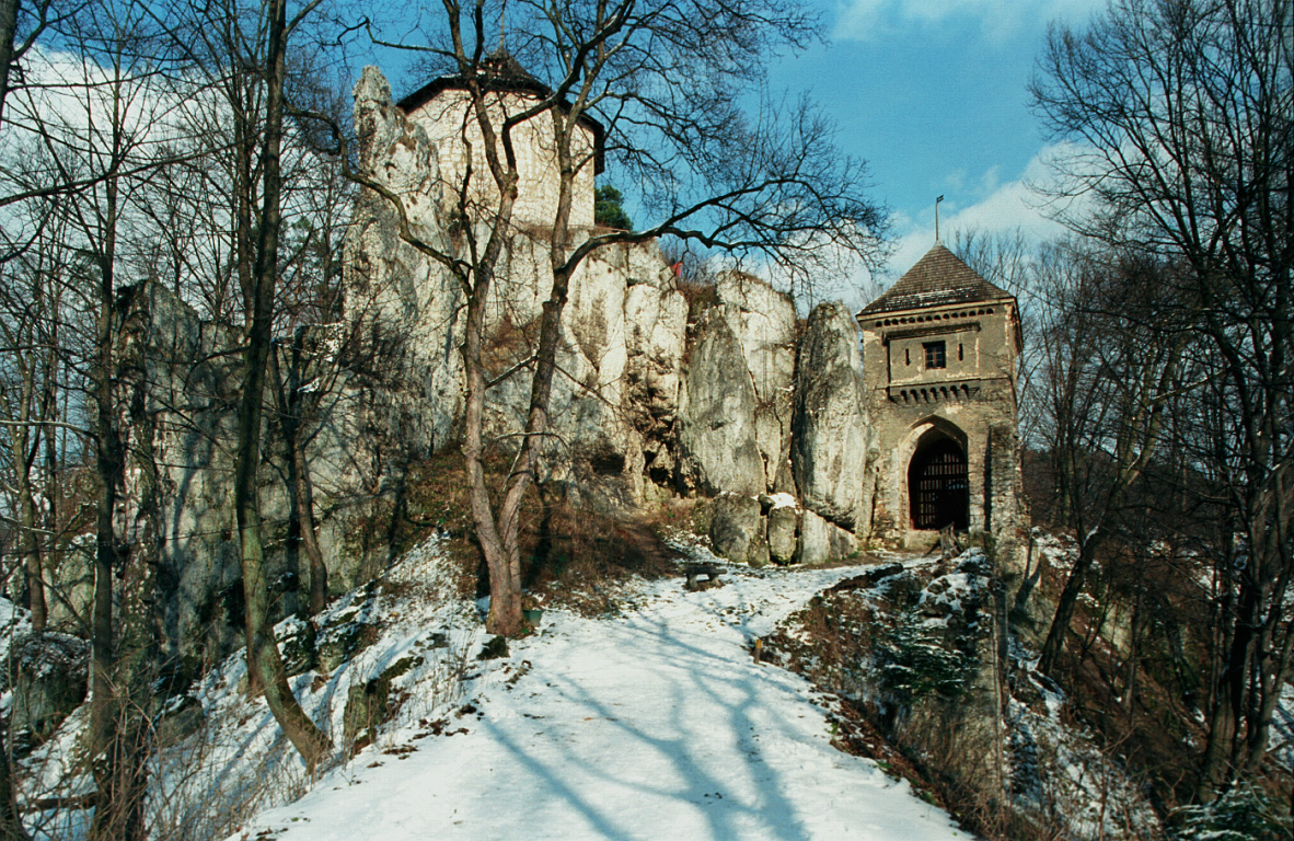 Ojców